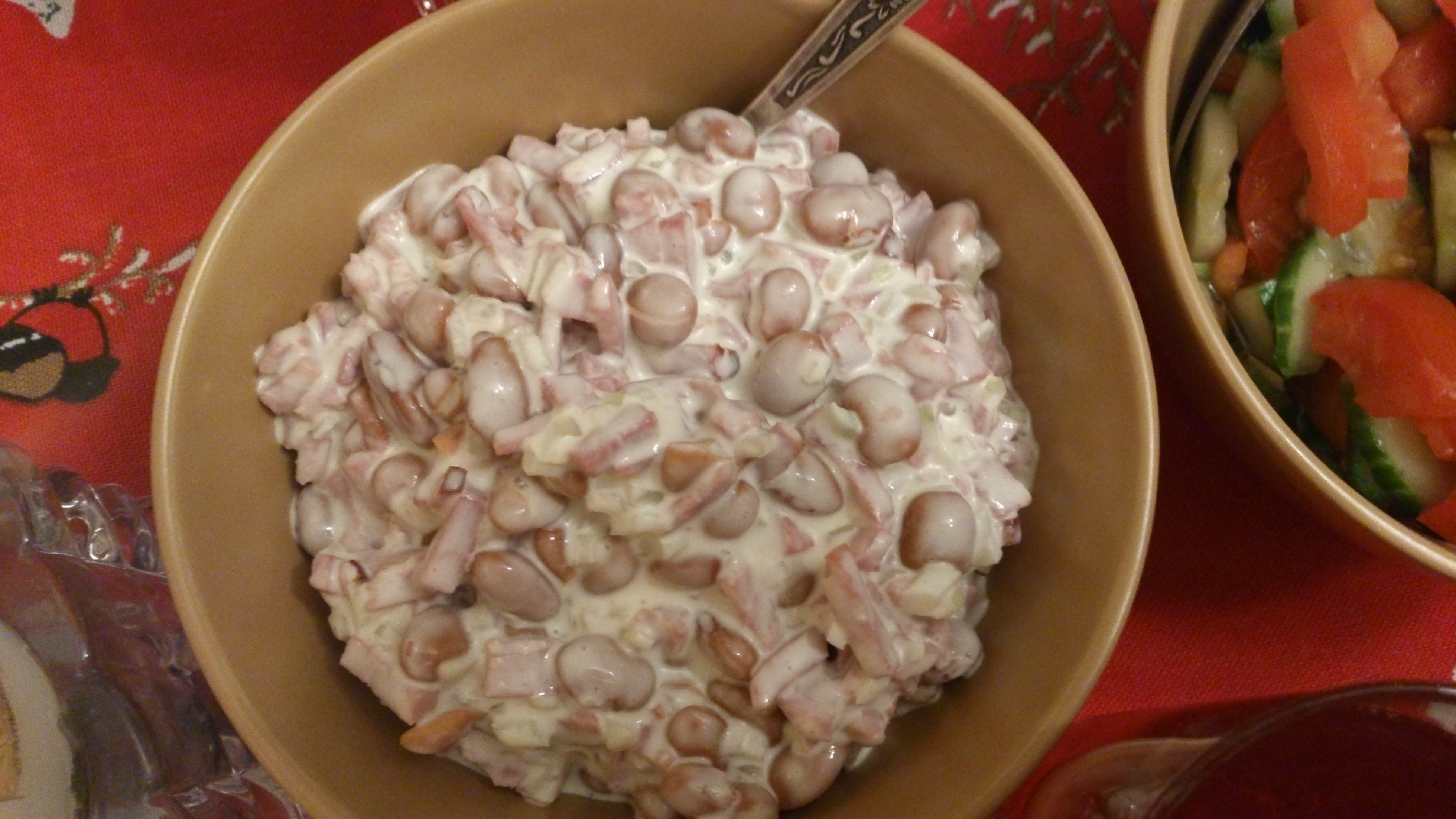 Oasalat